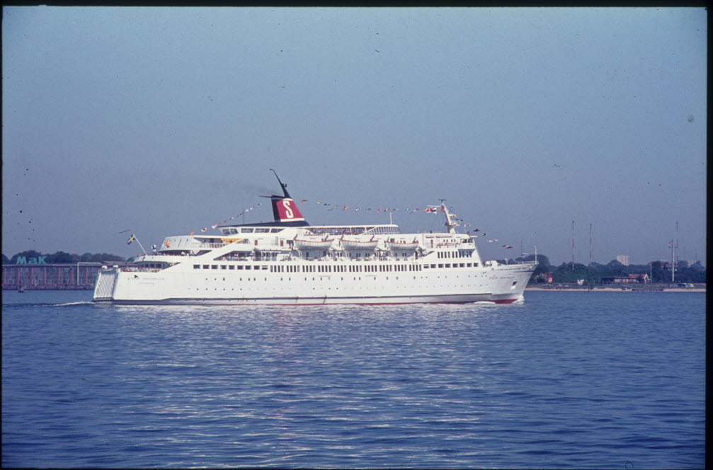 vor Friedrichsort.